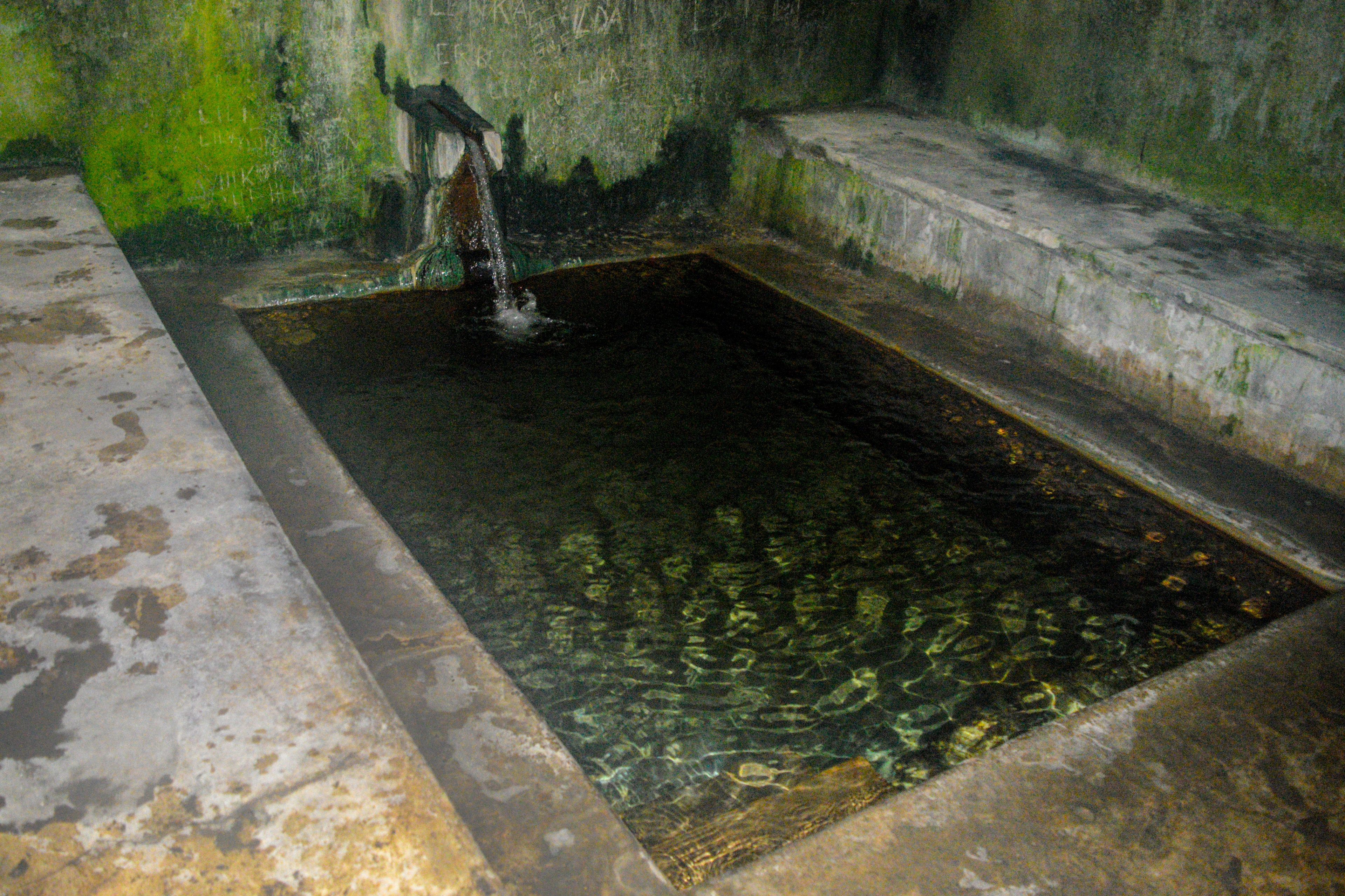 Hamam Mehmed paše Sokolovića, smešten u mirisnoj borovoj šumi, na petom kilometru puta od Višegrada u pravcu zaseoka Prelovo. Nalazi se na nadmorskoj visini od 460 m. Prema tvrdnjama stručnjaka, termalne vode koje protiču kroz te krajeve stare su preko trideset osam hiljada godina. Template:Tos17rsNKD276